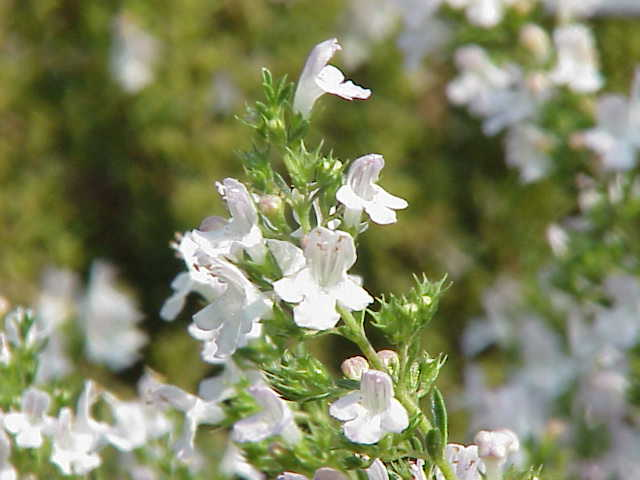 Species: Satureja montana Family: Lamiaceae Image No. 1